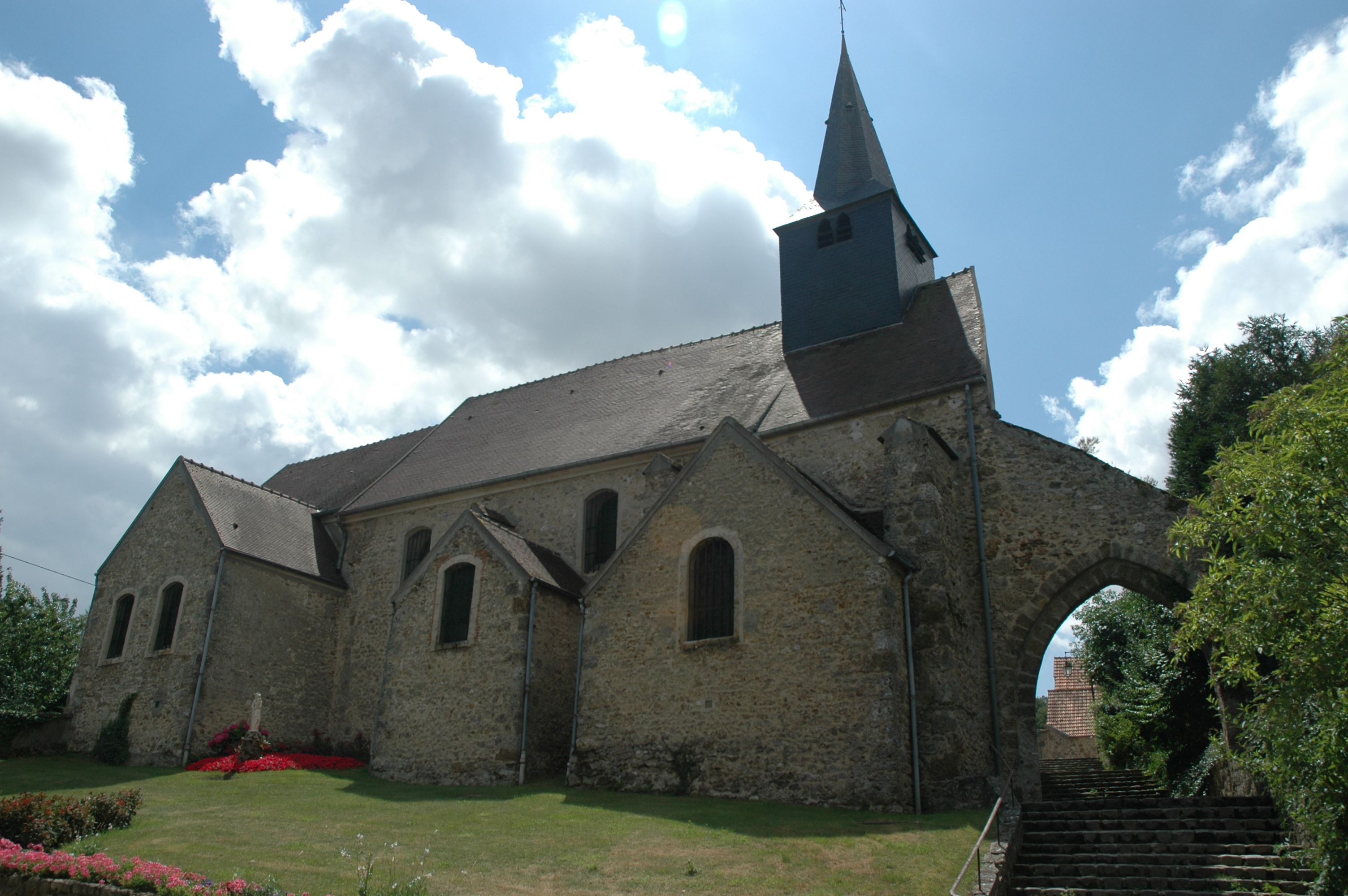 Église Saint-Sauveur de Maurepas (Yvelines) 78310 Auteur : Richard Moch